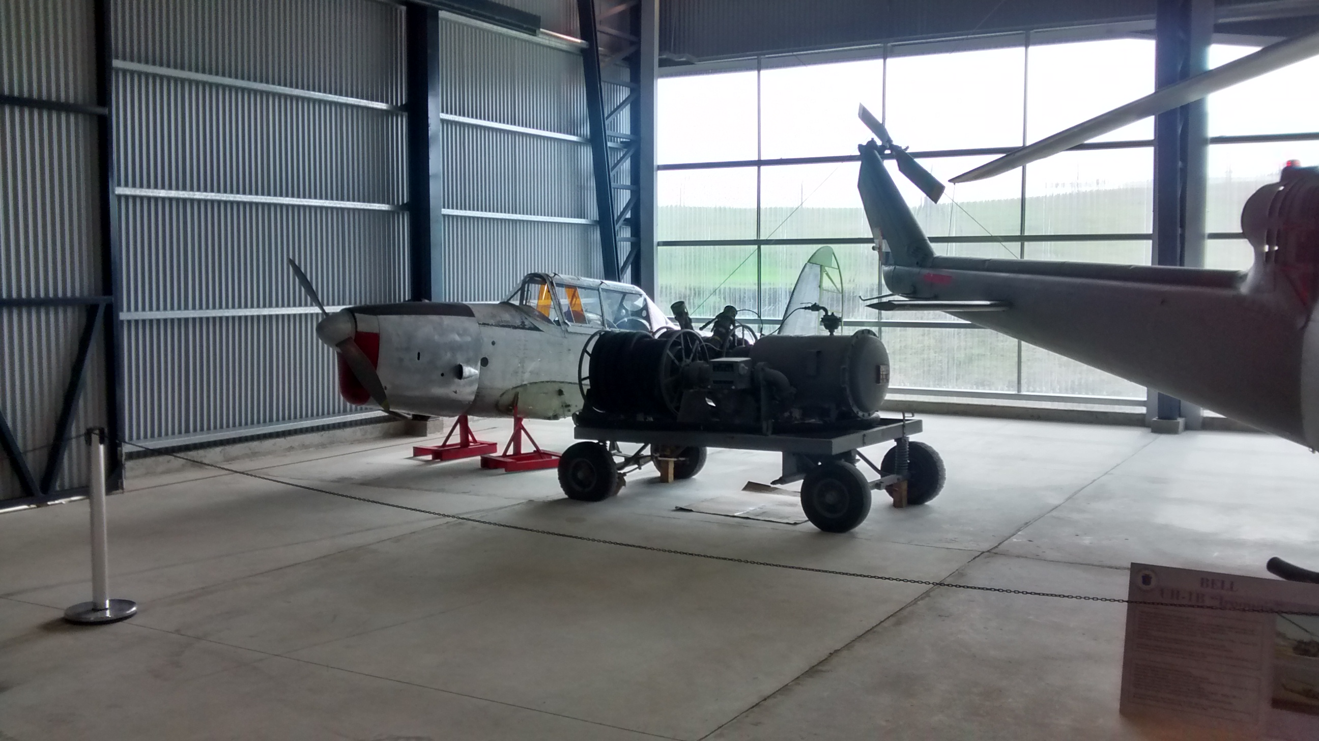 De Havilland CX-AVA